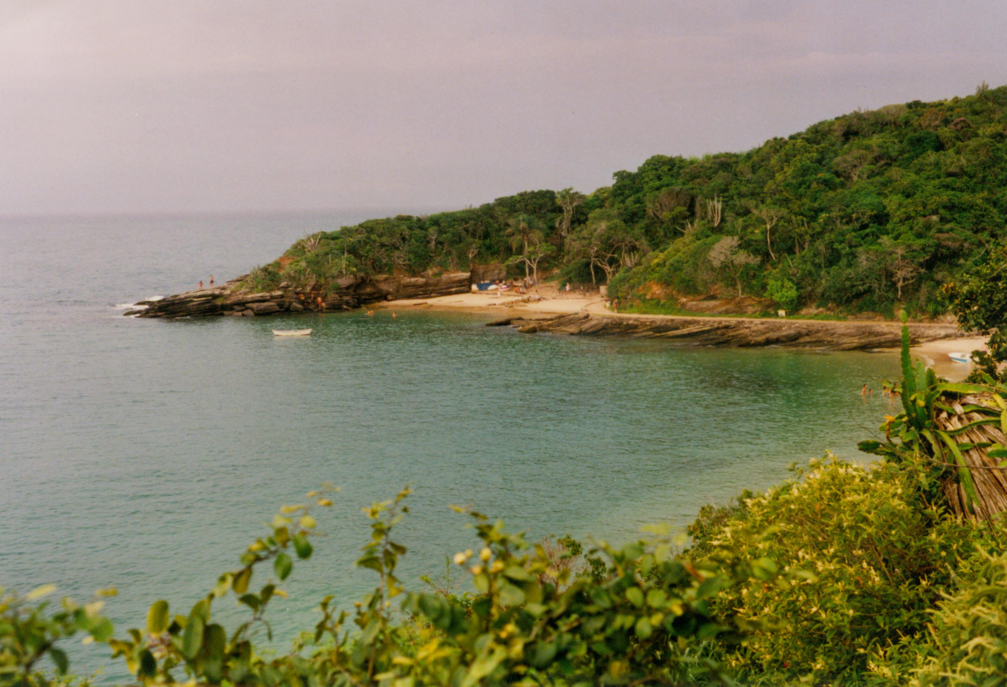 Búzios, Rio de Janeiro, Brasilien